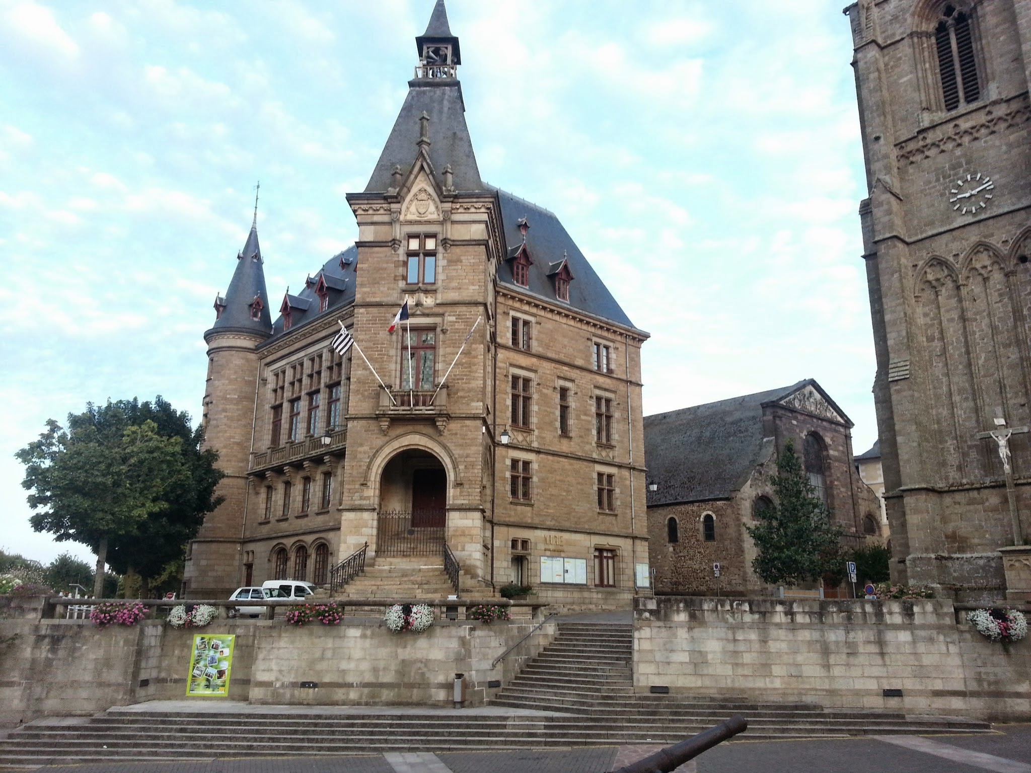 Redon